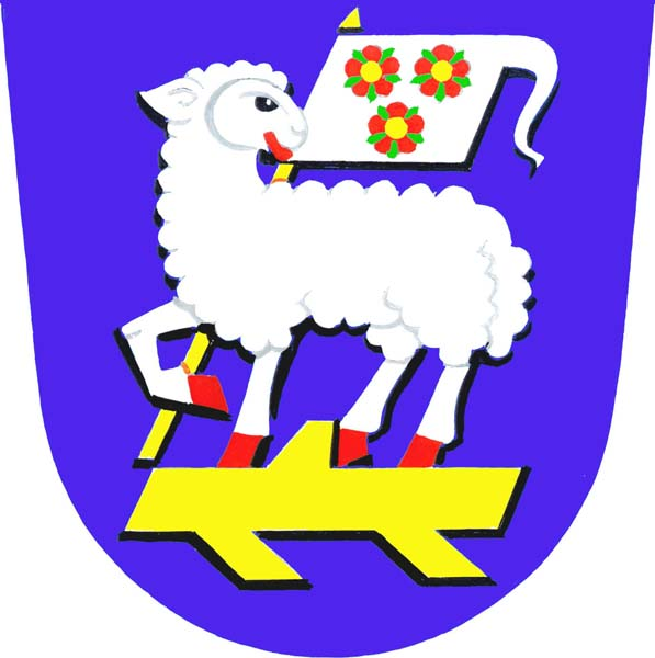 Znak obce Česká Metuje